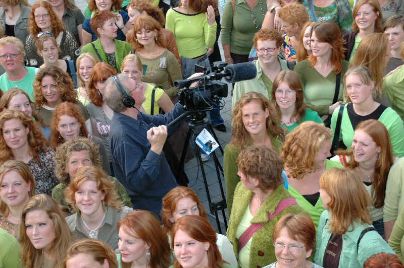 Jac Kouwelaar filmt tijdens de Roodharigendag 2005 in Asten